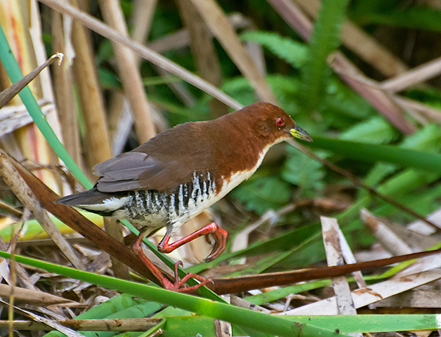 Piraju-SP - Brasil